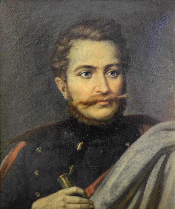 Portretul lui Avram Iancu,Ulei pe pânză 50 x 40,5 cm, Nesemnat, Nedatat, Muzeul de Artă din BrașovNr. inv. 582